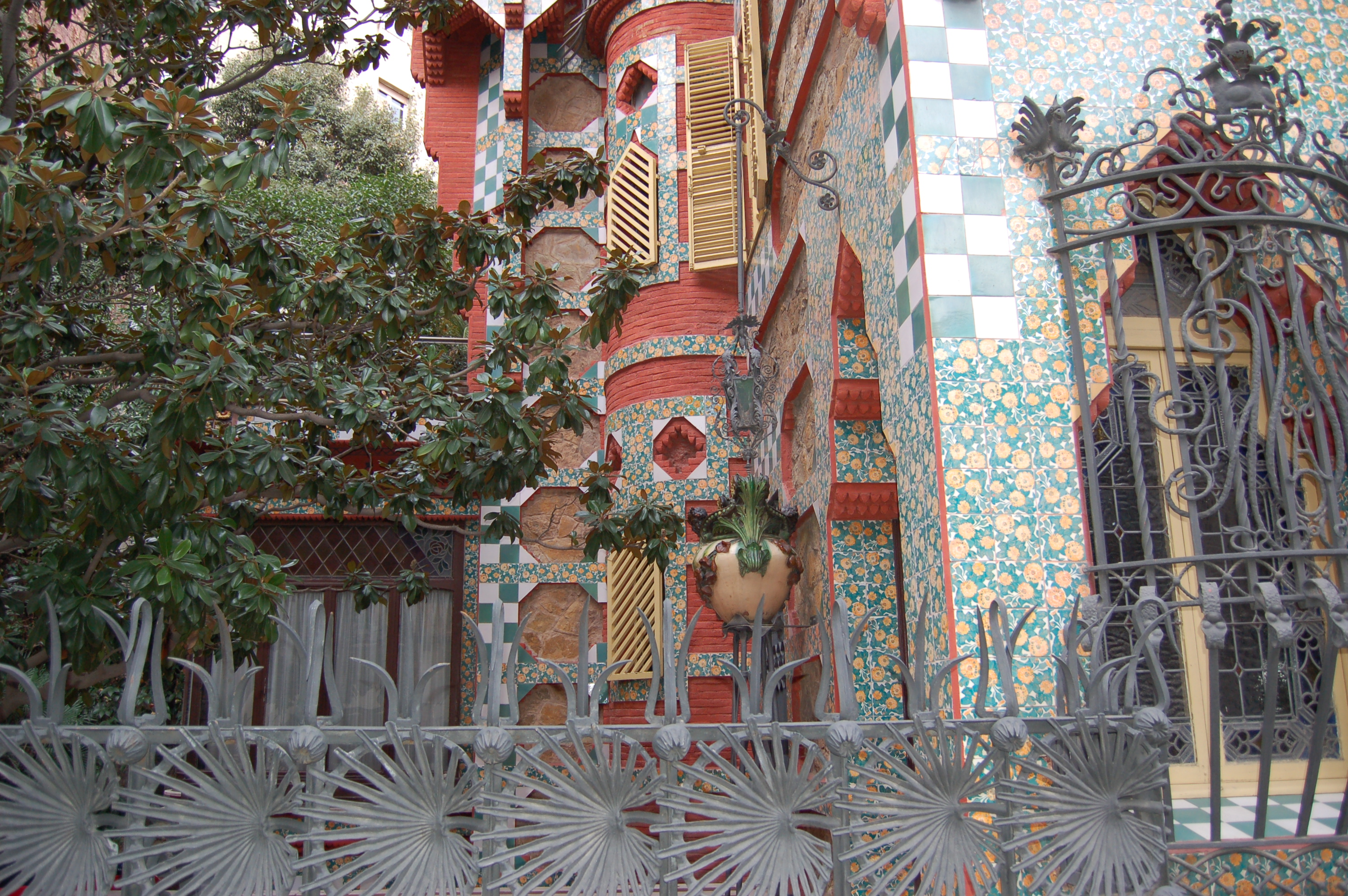 Barcelona, casa Vicens (Antoni Gaudí)